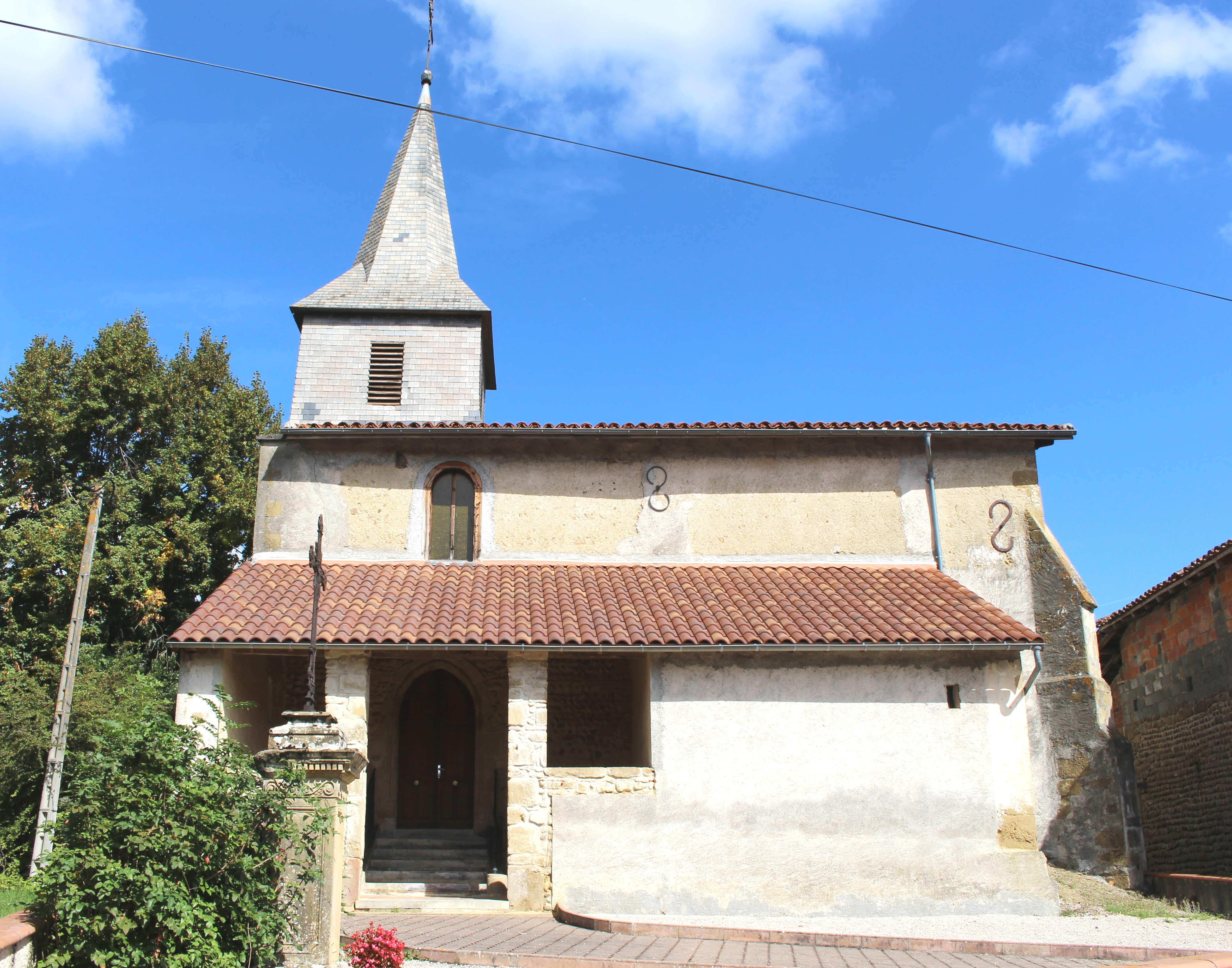 Église de l'Assomption de Pouy (Hautes-Pyrénées)